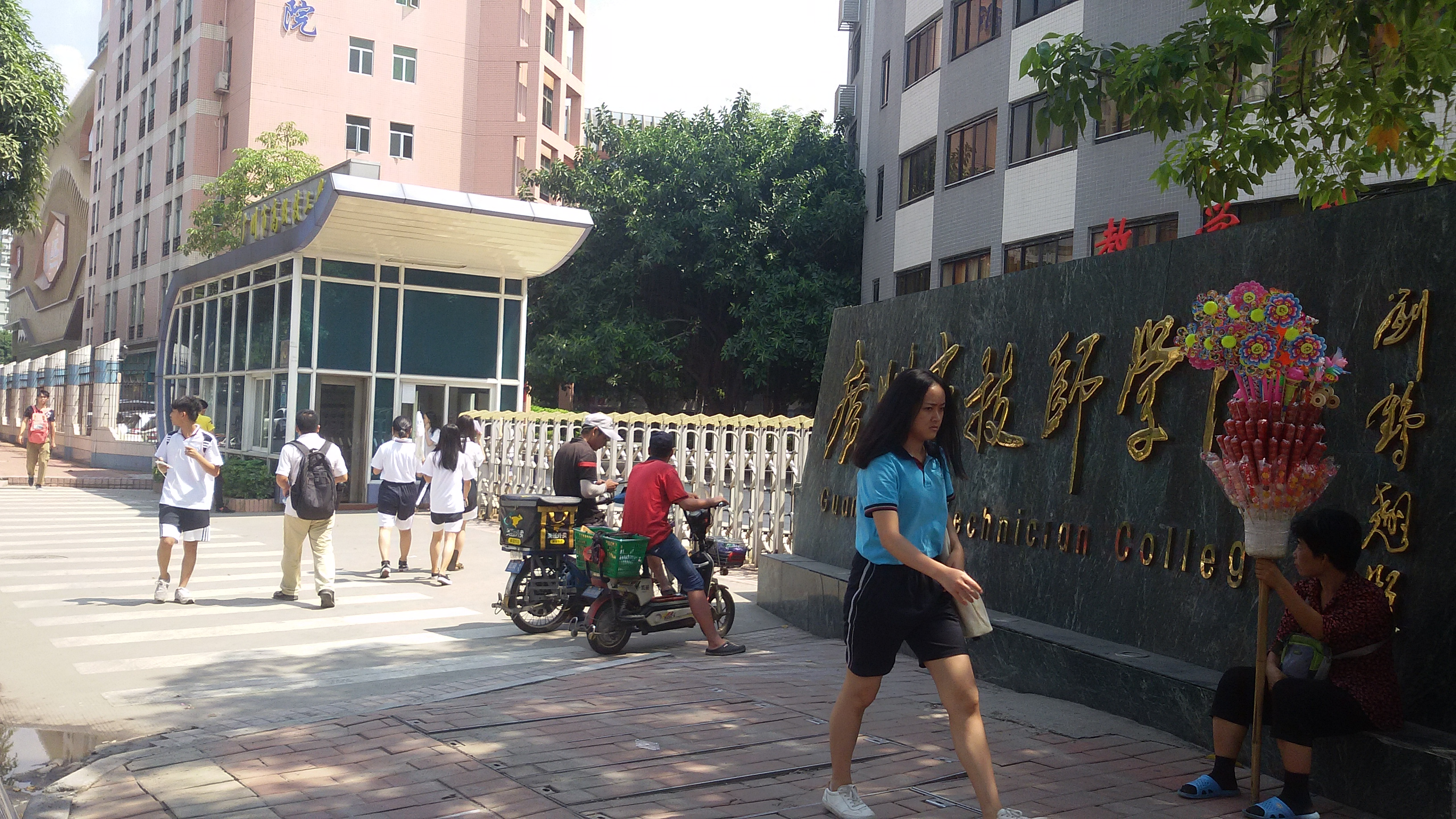 粵語: 廣州市高級技工學校（黃石校區）